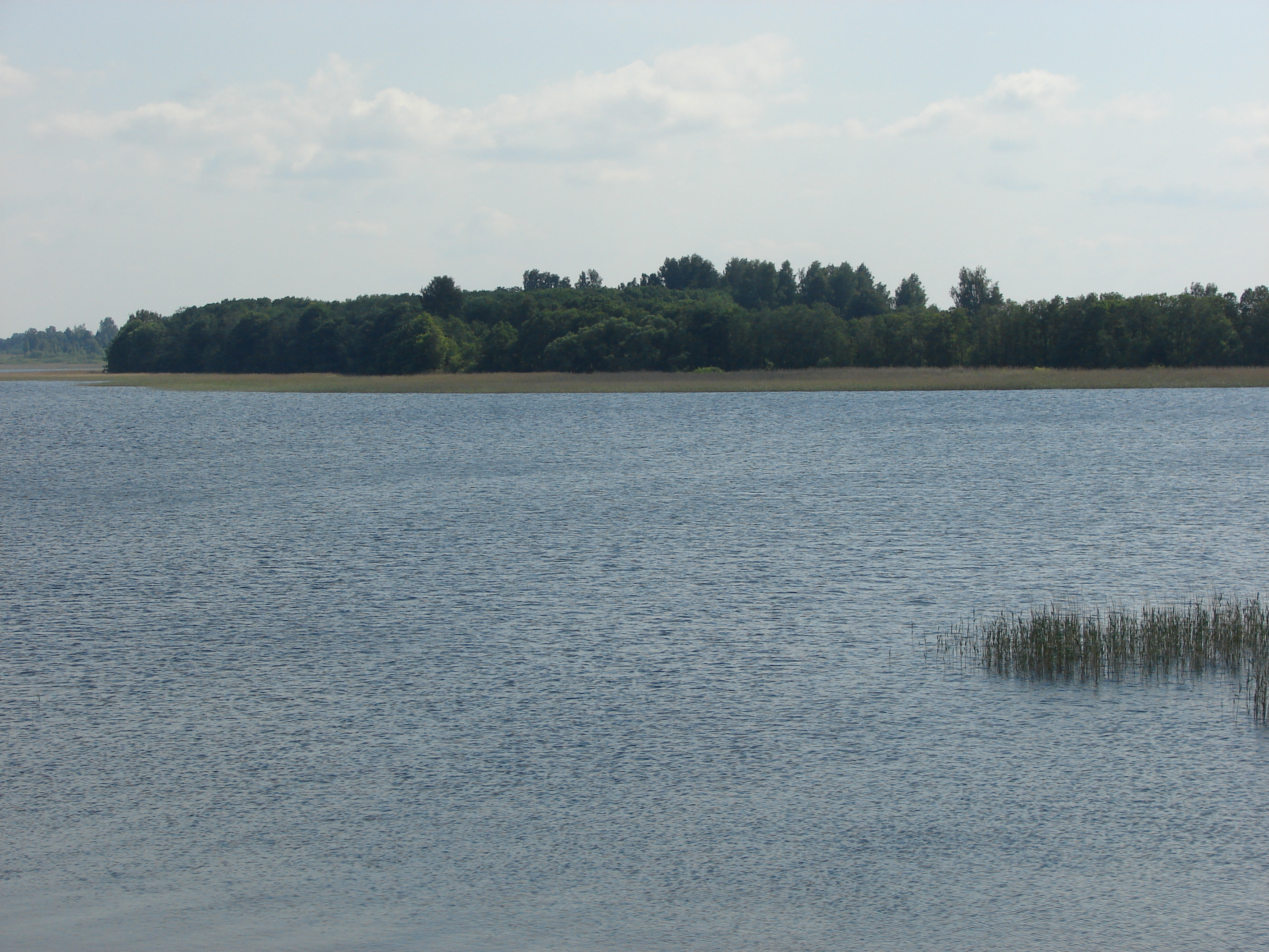 Rāznas ezers, Čornajas pagasts, Rēzeknes novads, Latvia